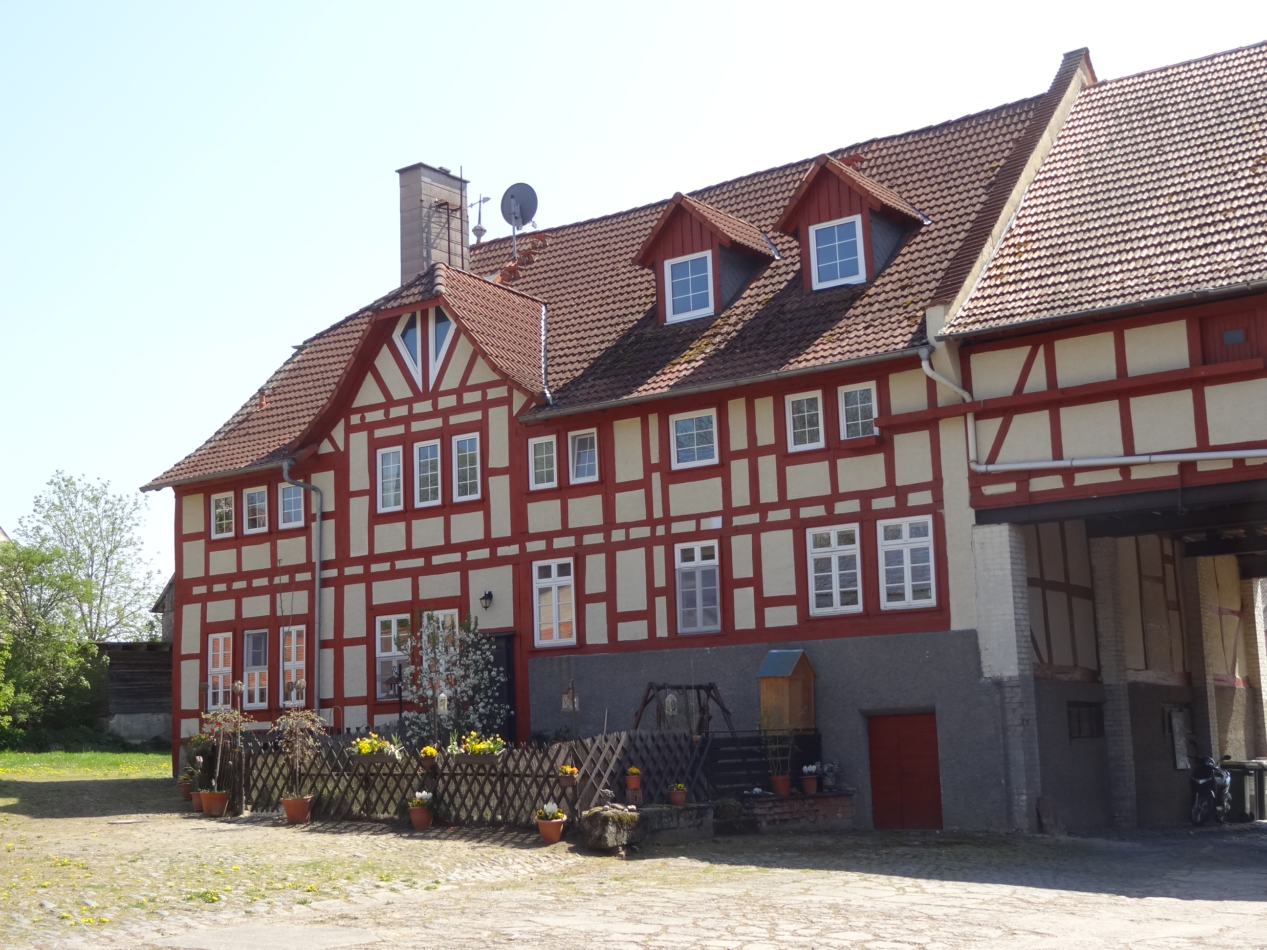 Neuhof (Leihgestern)